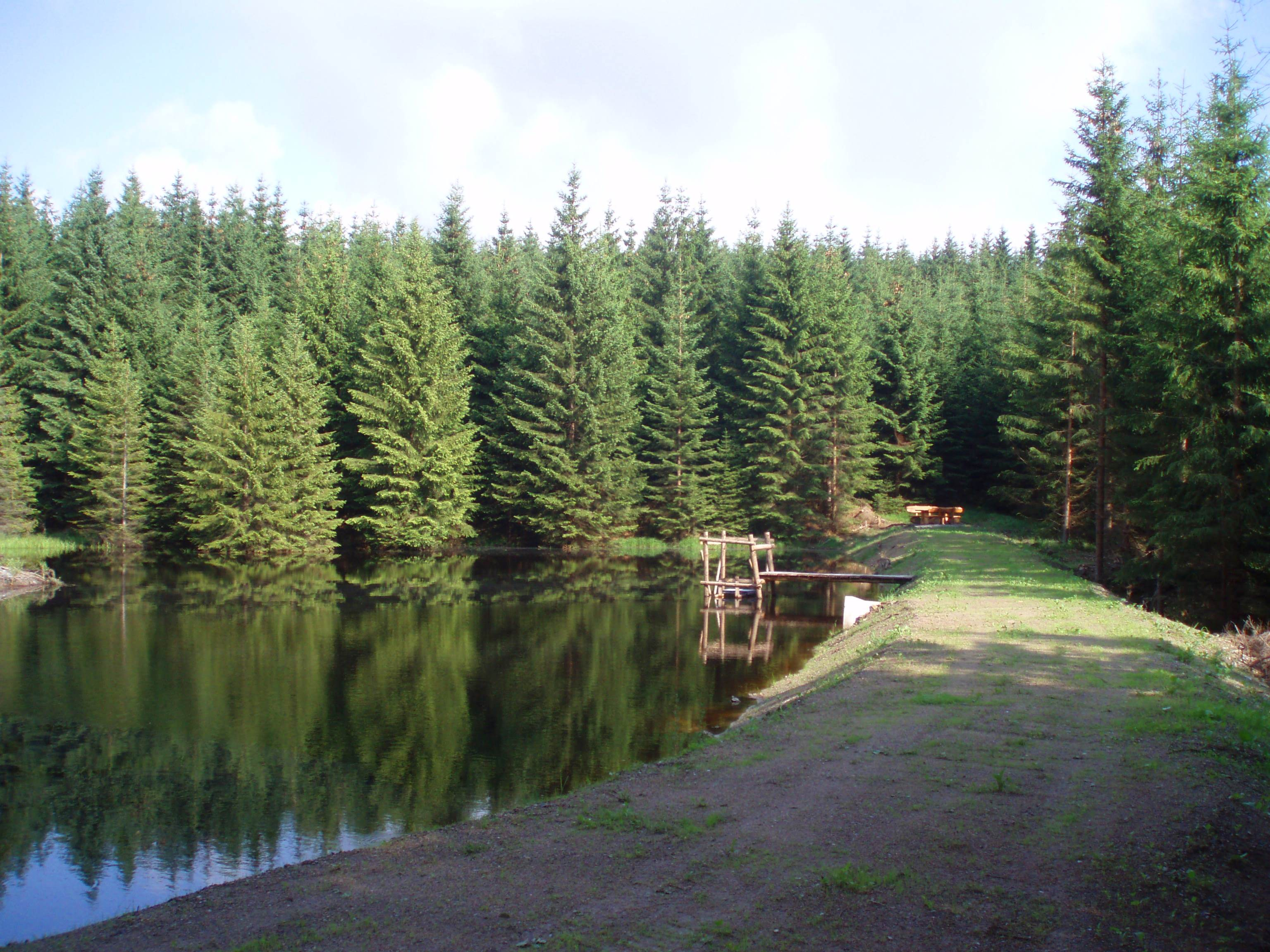 Preißhausteich